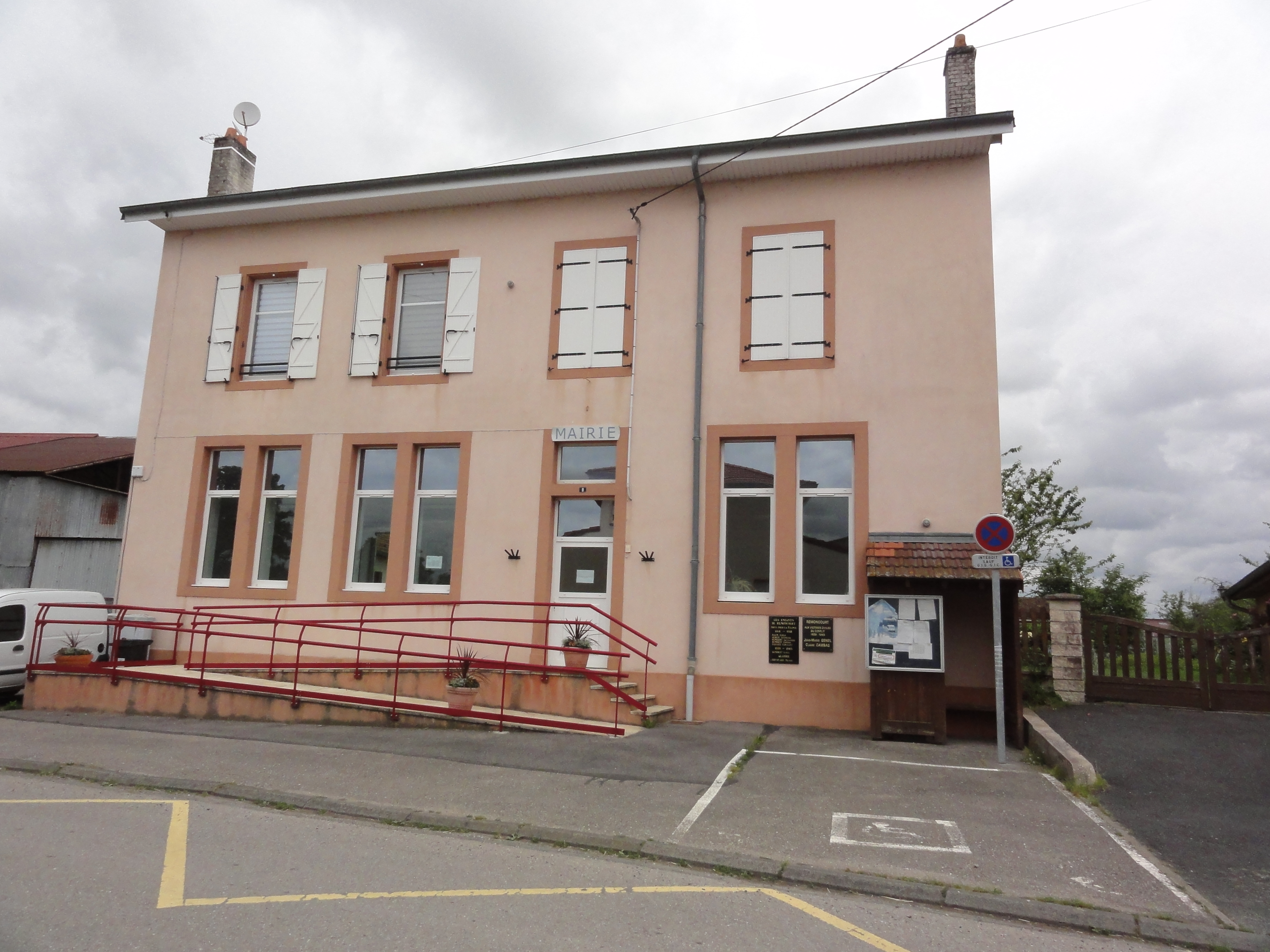 Remoncourt (M-et-M) mairie